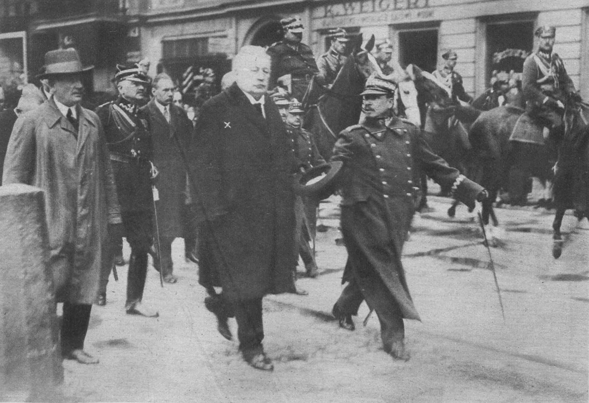 Uroczyste powitanie wojsk części poznańskiego garnizonu, wracających z Warszawy po zamachu majowym. Widoczny biorący udział w tej uroczystości marszałek Senatu Wojciech Trąmpczyński (w środku), gen. Józef Haller (z prawej) oraz komisarz miasta płk. Bukowiecki i były minister Stanisław Osiecki (z lewej).